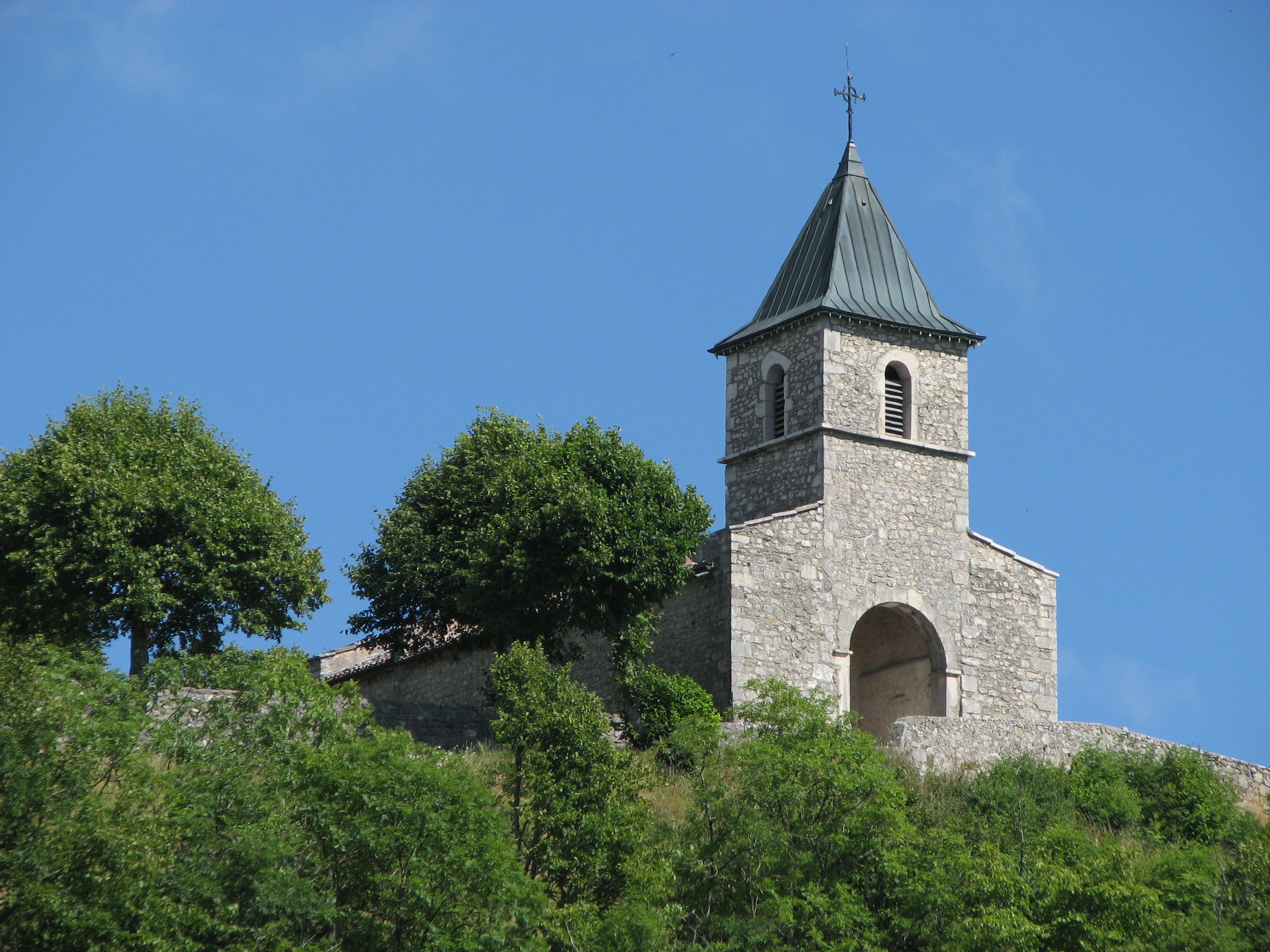 Église d'Innimont (Ain)